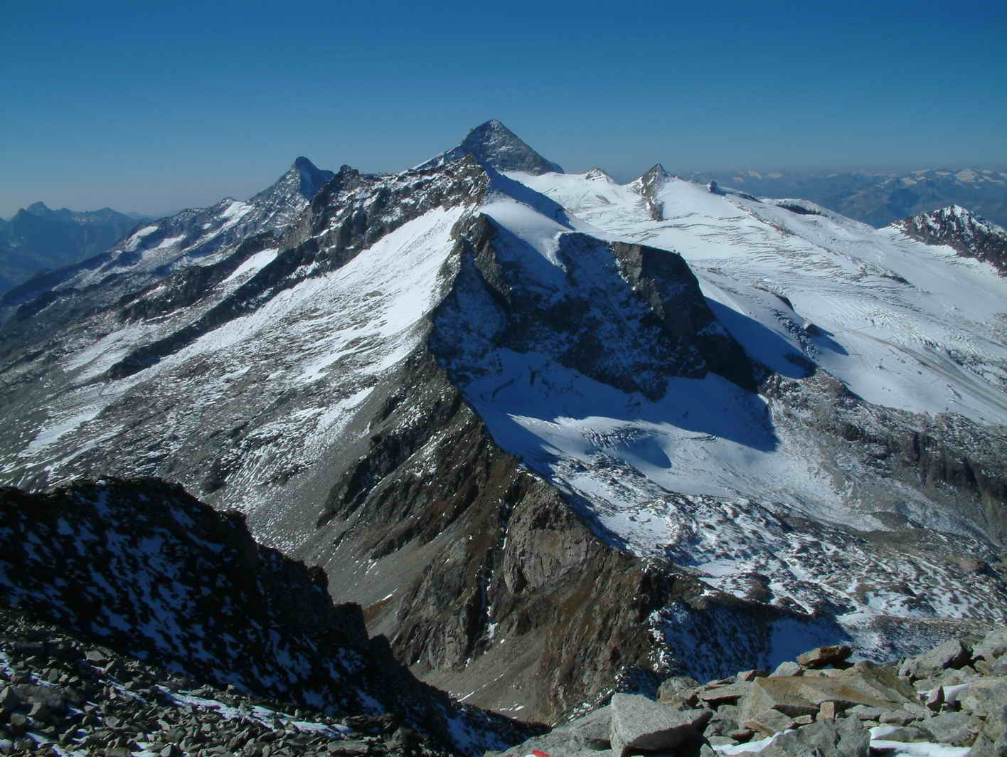 Olperer a ledovec Tuxer ferner